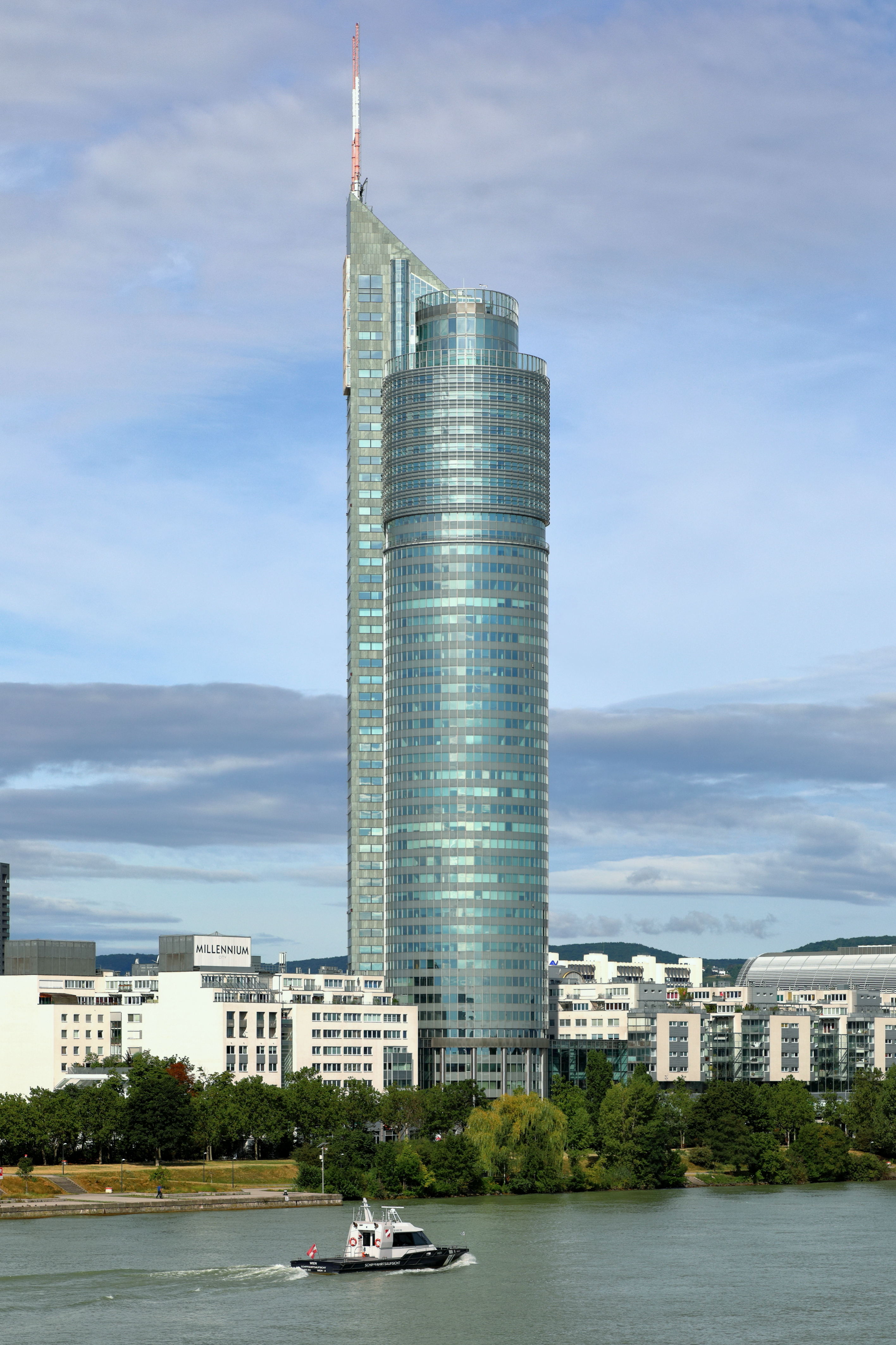 Der Millennium Tower im 20. Wiener Gemeindebezirk Brigittenau von der Brigittenauer Brücke aus gesehen.Das Büro- und Wohnhochhaus wurde von 1997 bis 1999 nach Plänen der Architekten Gustav Peichl, Boris Podrecca und Rudolf F. Weber für den Bauherrn Georg Stumpf mit einem Kostenaufwand von rd. 210 Millionen Euro errichtet. Das Gebäude hat eine Gesamthöhe von 202 Meter (Dachfirst 160 Meter) und ist damit nach dem Donauturm (252 Meter) und dem ersten Hochhaus der DC Towers (250 Meter) das dritthöchste Gebäude Wiens. Der Tower hat über 50 Geschosse, rund 47.200 Quadratmeter Büro- und 30.000 Quadratmeter Wohnfläche sowie 14.000 Quadratmeter für Dienstleistungs- beziehungsweise 10.000 Quadratmeter für Einzelhandelsbetriebe.